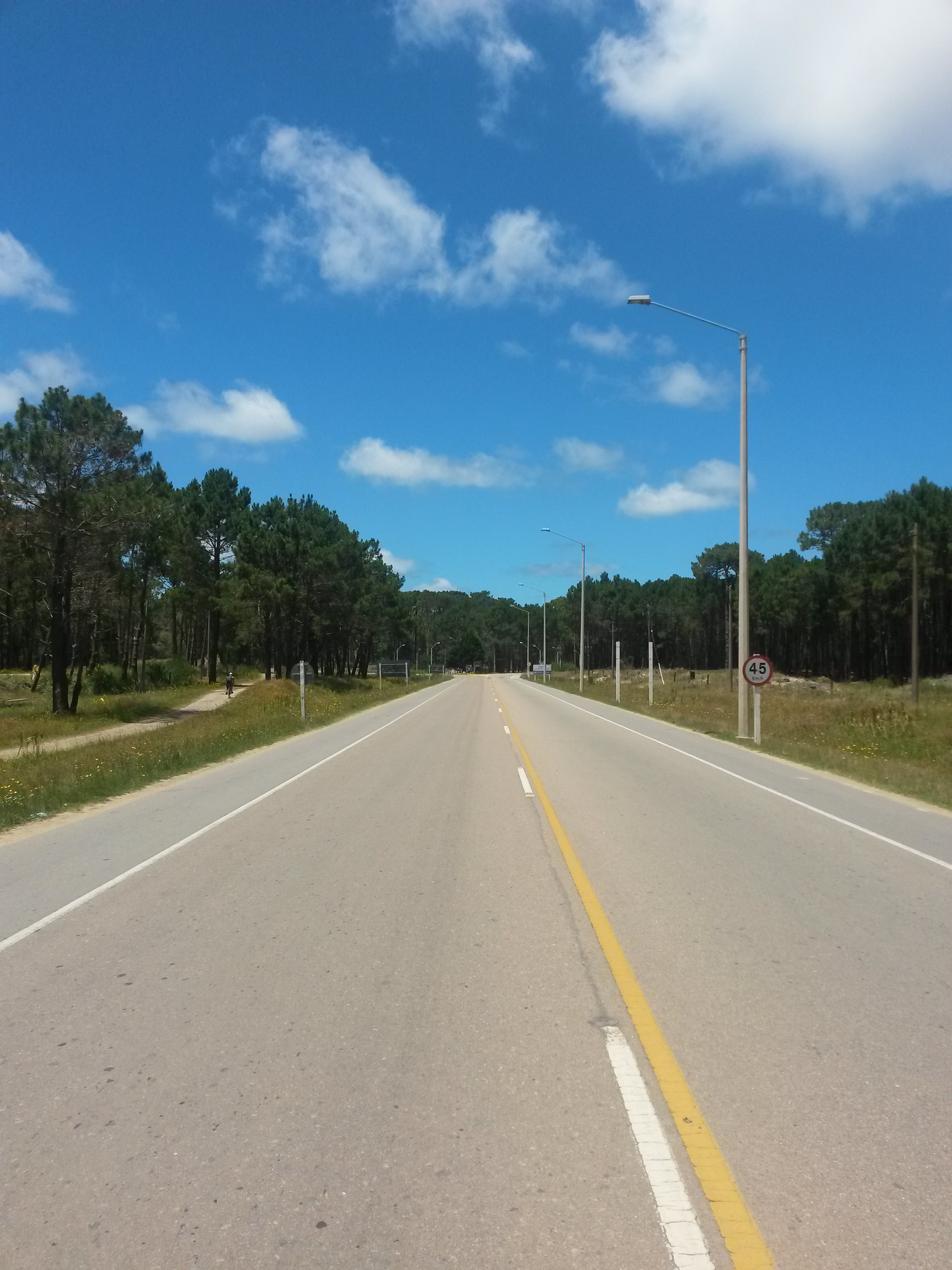 Ruta 15 próximo a La Paloma, Uruguay